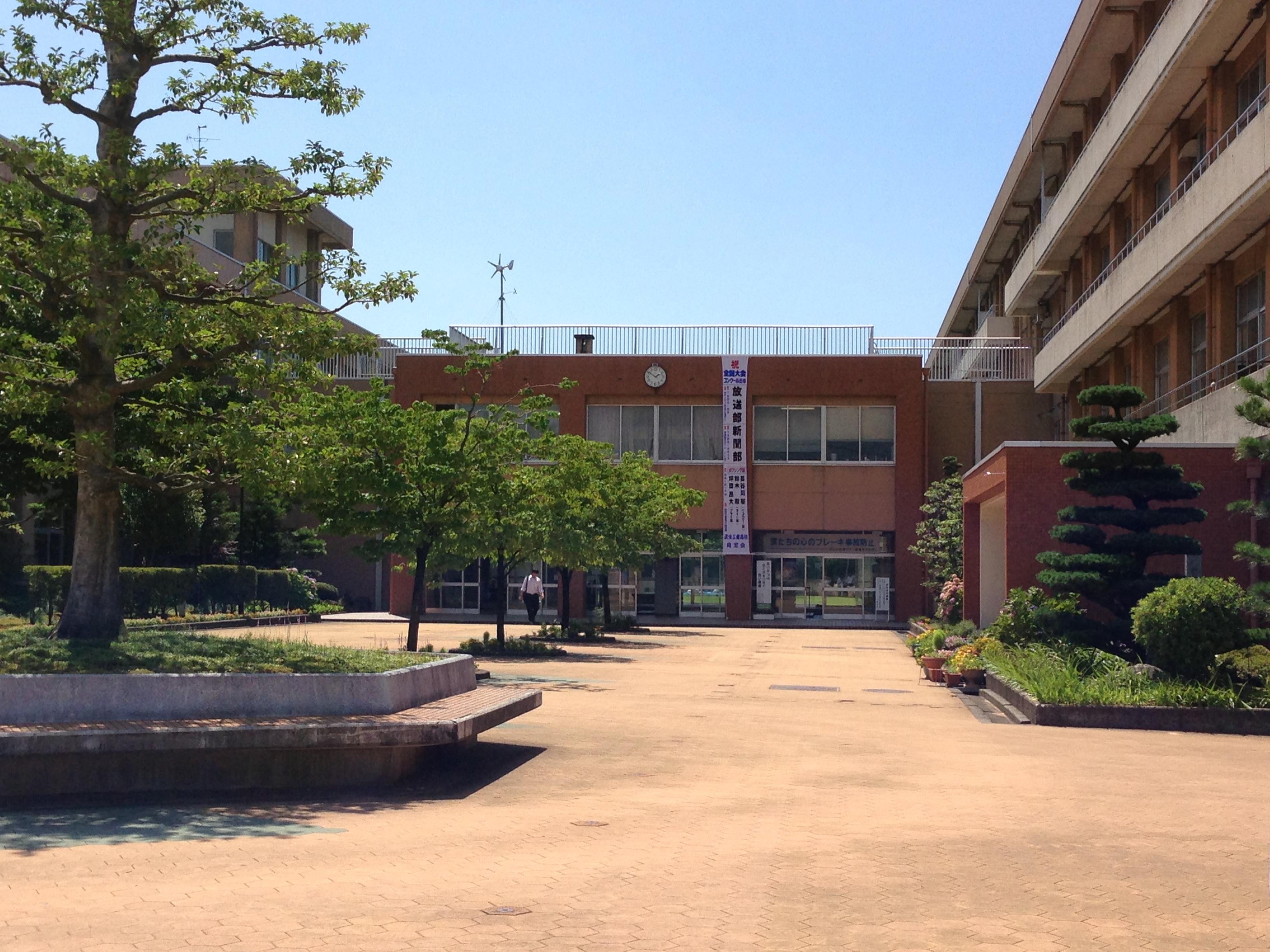 武生工業高校の写真です